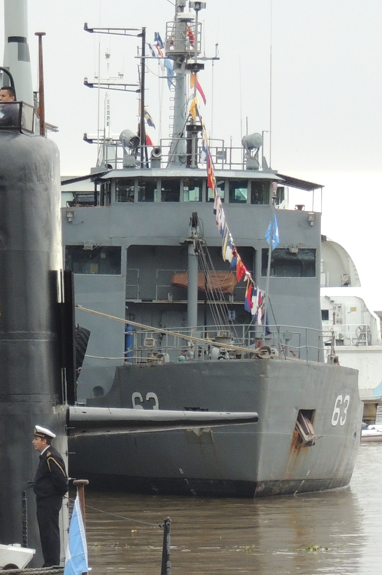 Submarino ARA San Juan en el Apostadero Naval de Buenos Aires, durante una jornada de puertas abiertas en mayo de 2017 por el día de la Armada Argentina. De fondo de se ve el aviso ARA Puerto Argentino